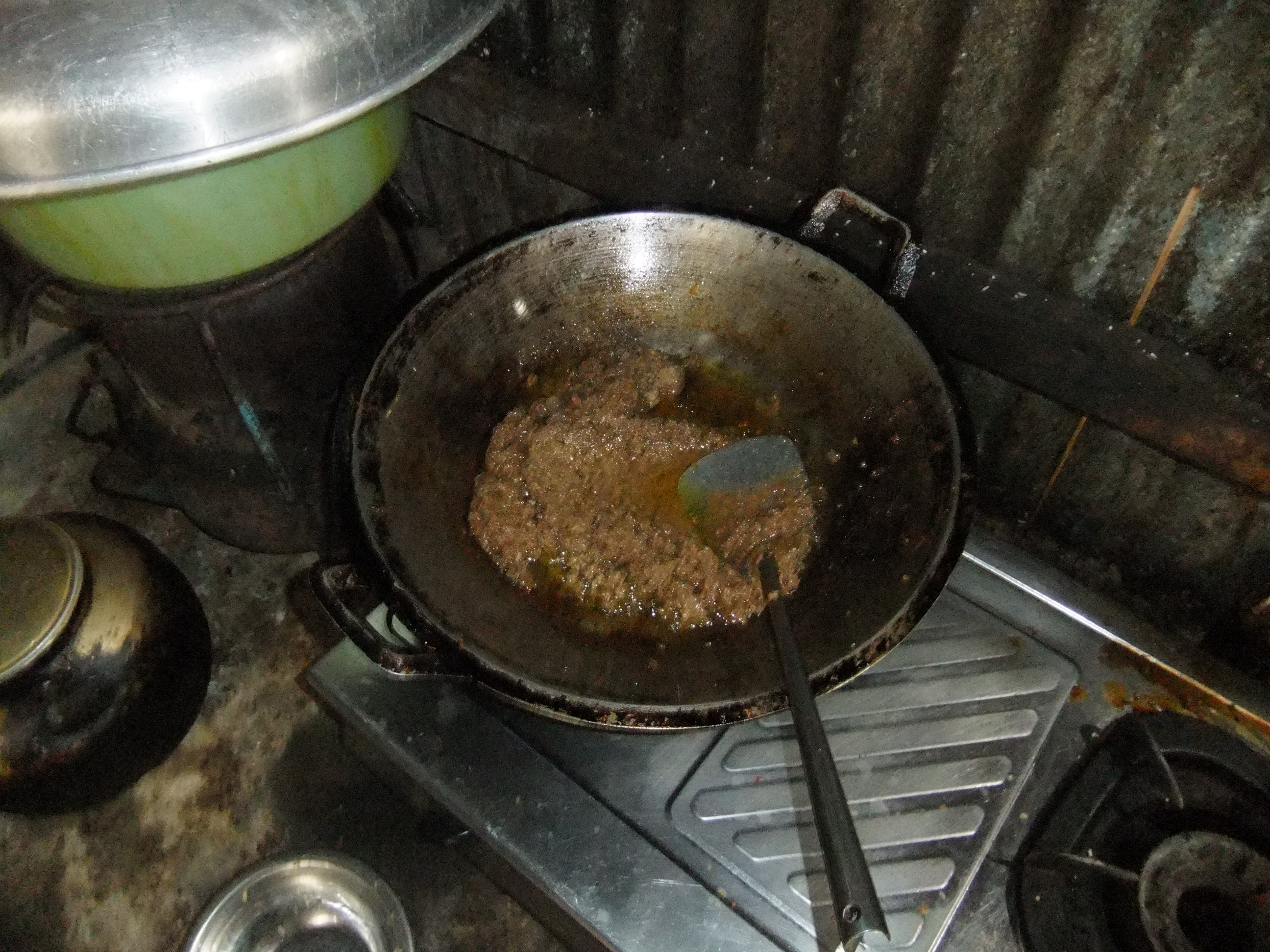 Bumbu masakan Makassar